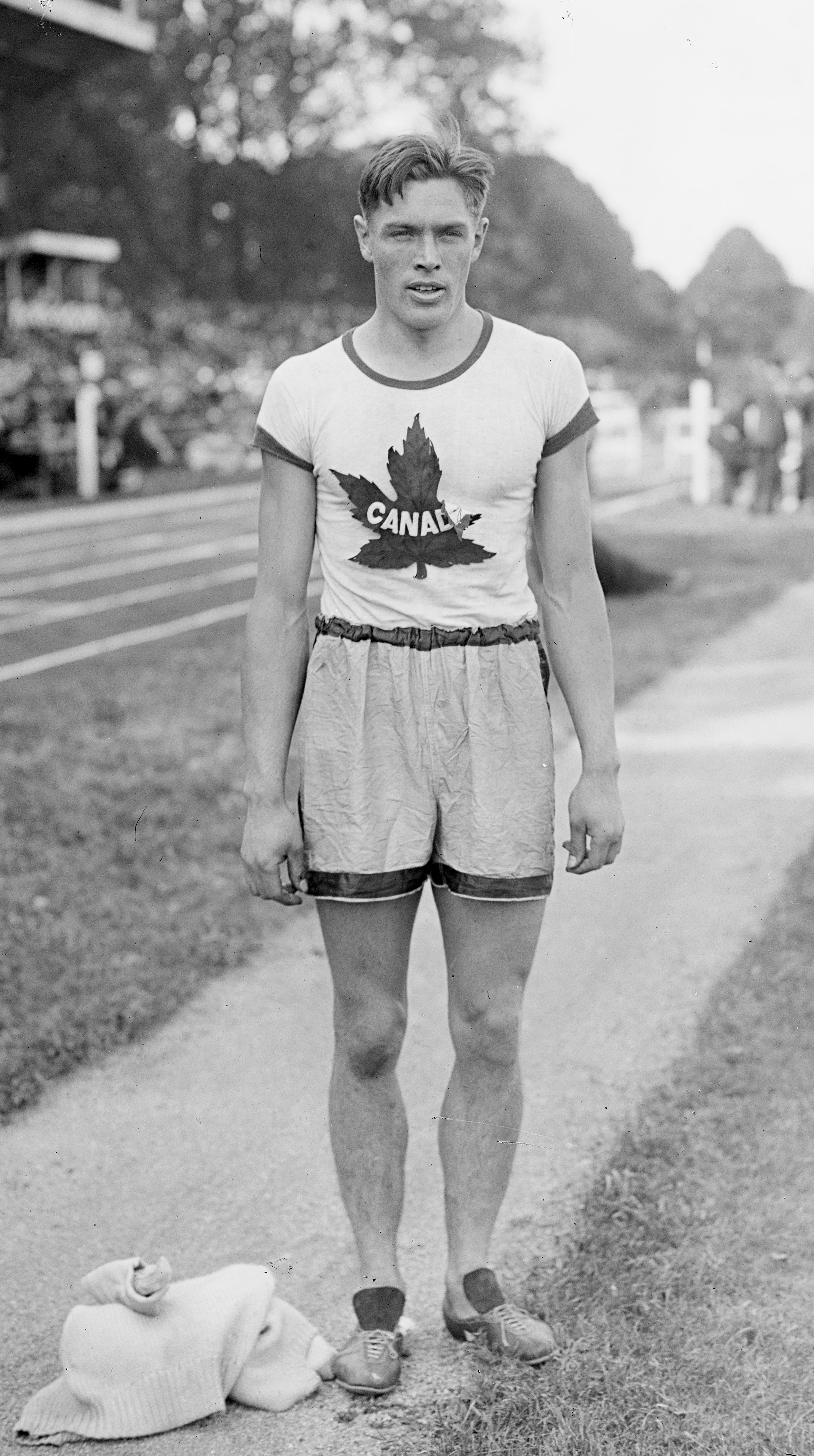 29-8-20, Colombes, portrait de Tommy Thomson (Canadien) coureur de 110 m haies.